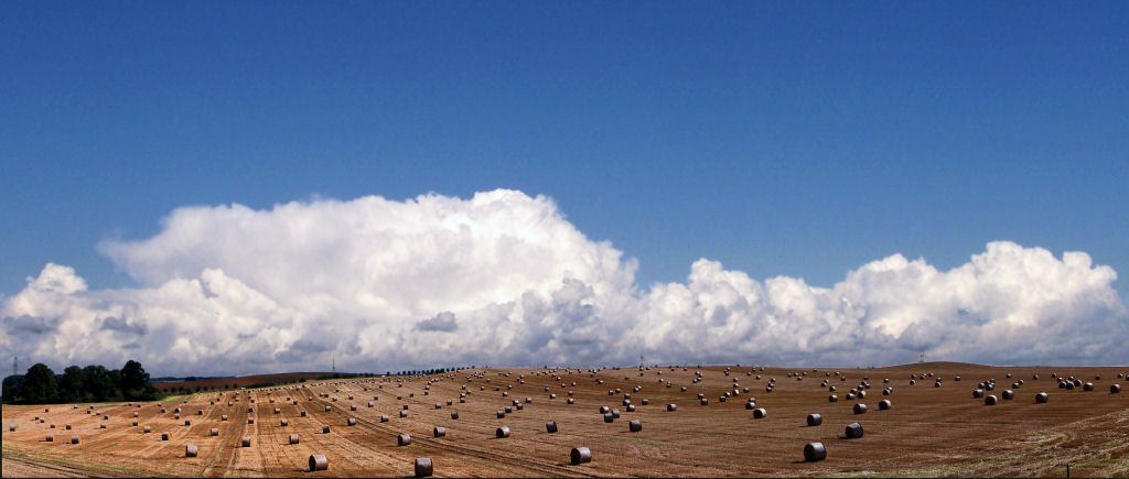 Stoppelfeld bei Cambs